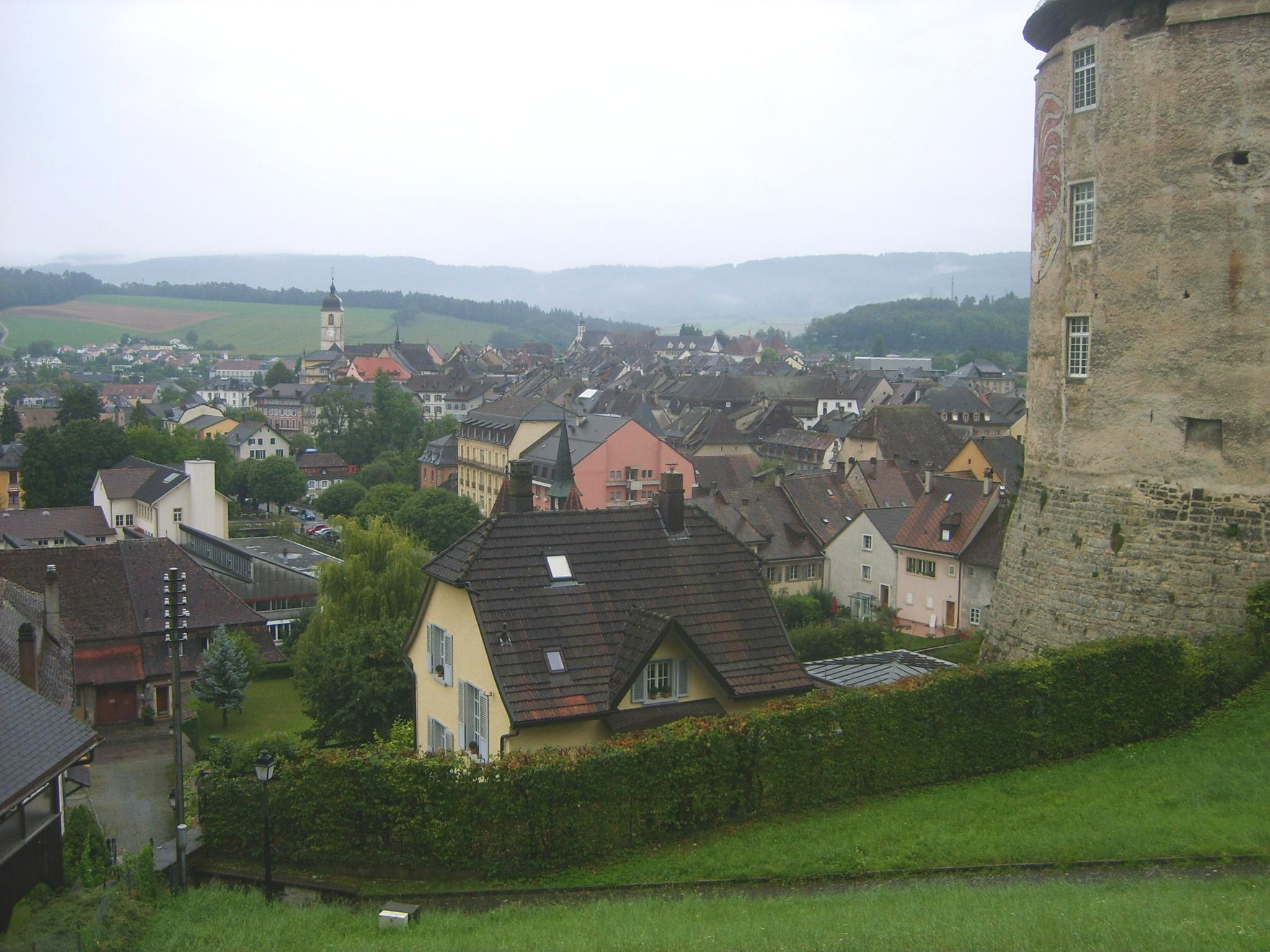 vue générale du centre ville de Porrentruy depuis le Chateau et la tour du Coq